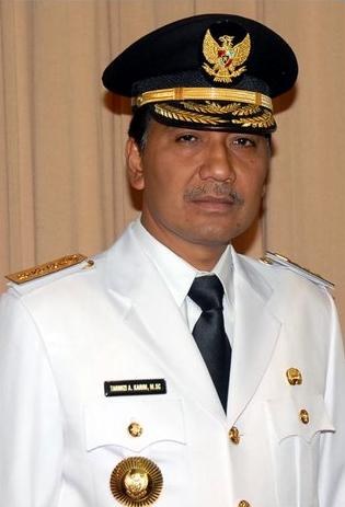 Tarmizi Abdul Karim sebagai Gubernur Kalimantan Timur Kategori:Tokoh Aceh